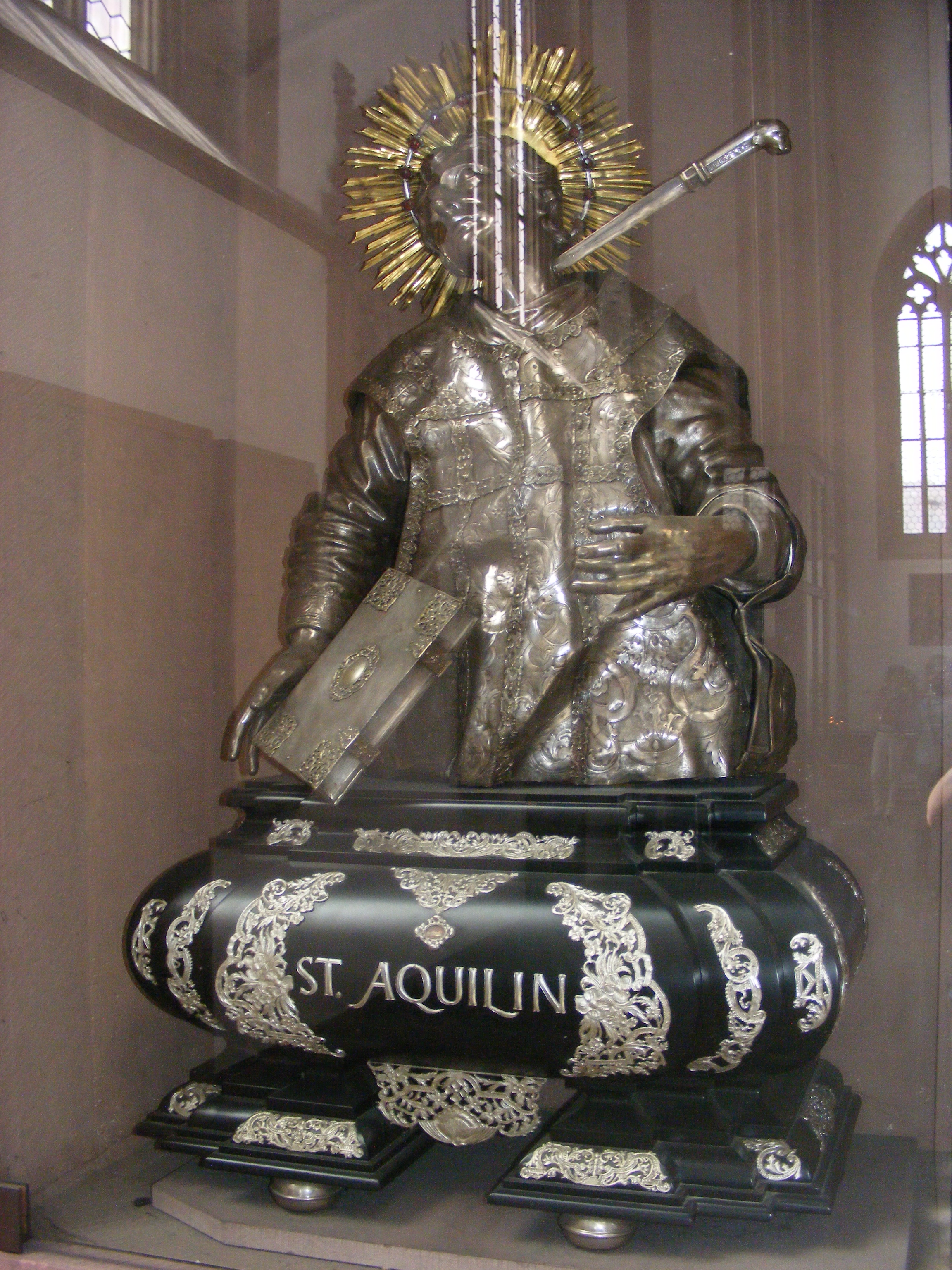 Würzburg, Marienkapelle, silbernes Büsten-Reliquiar des hl. Aquilin, um 1700